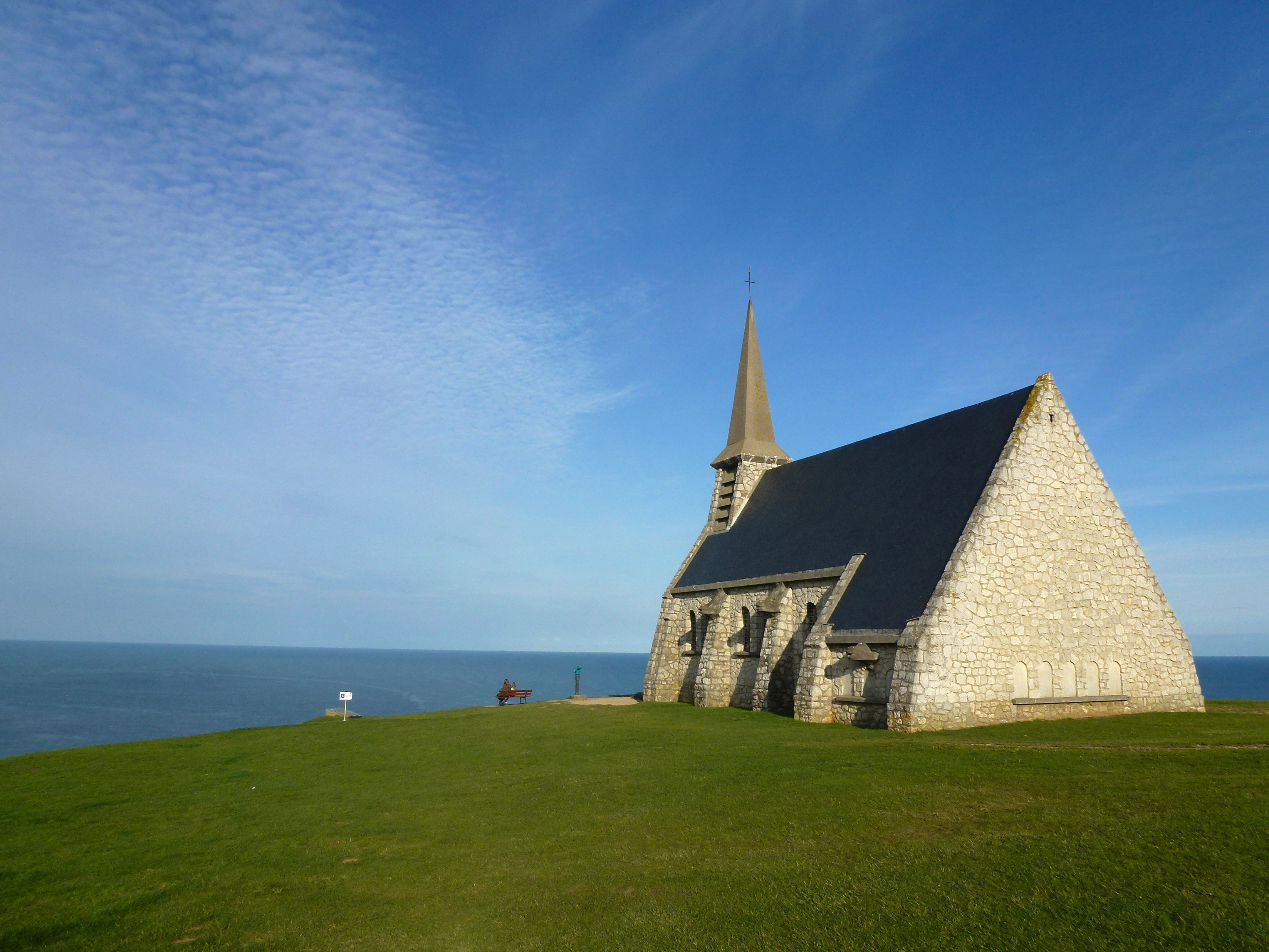 .au/research/etretat .au/research/elsie-tranter